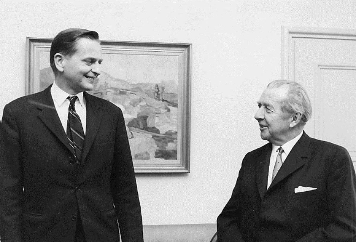 Kommunikationsminister Gösta Skoglund (t.h.) avgår från sin tjänst (som han innehaft sedan den 26.4.1957) och efterträdes här av konsultative statsrådet Olof Palme.